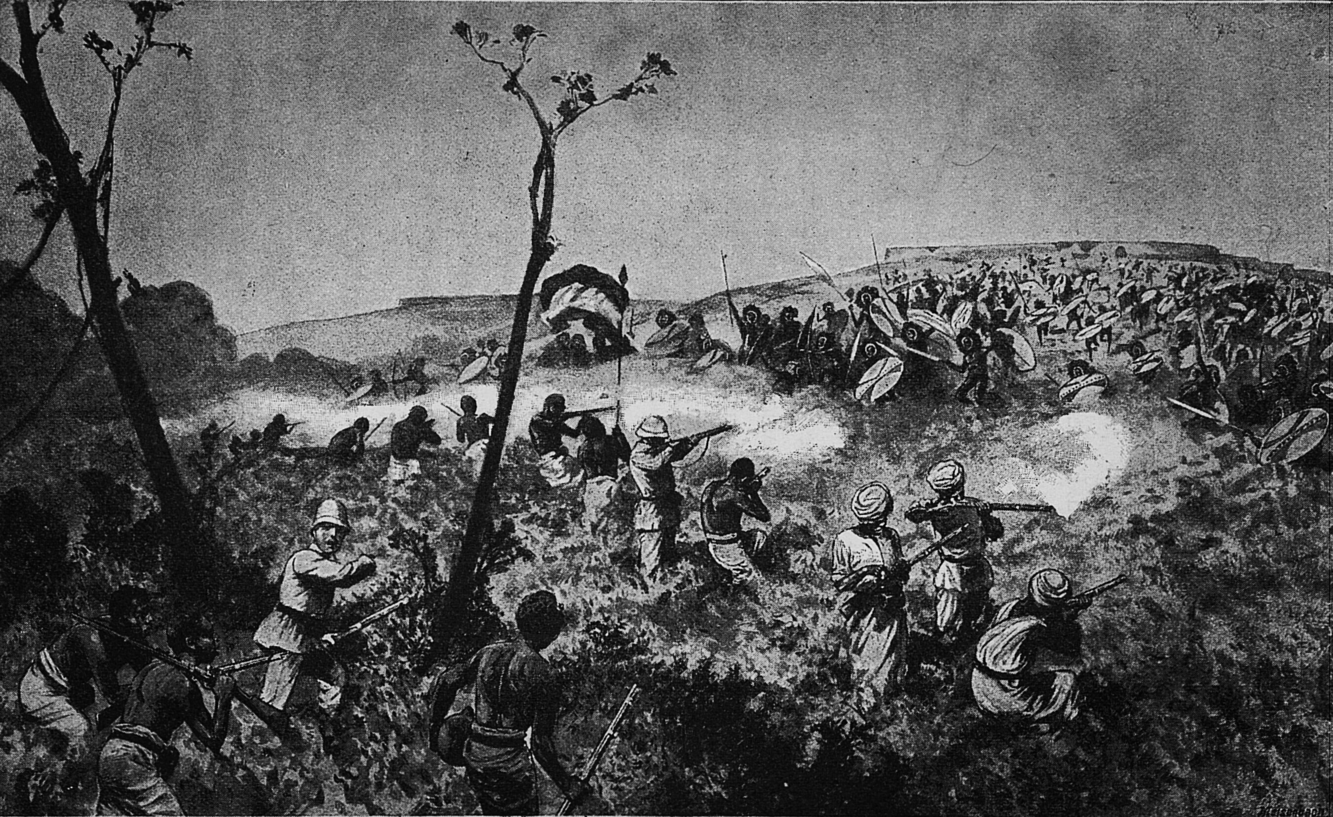 Illustrasjon hentet fra boken "Den tyske Emin Pascha-Expedition" av Peters, Carl og utgitt av Forlagsbureauet (Kjøbenhavn, 1891)